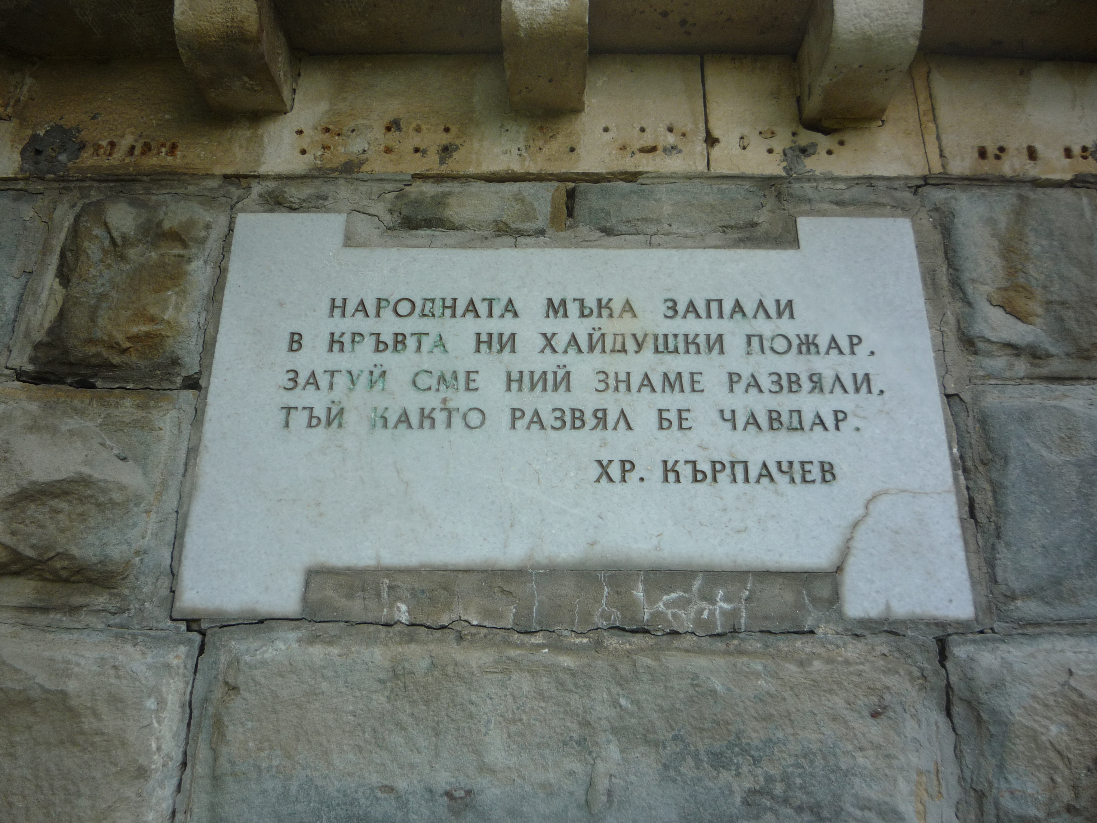 Фрагмент от паметника на Христо Кърпачев, местността „Сливешки ливади“, Ловеч.